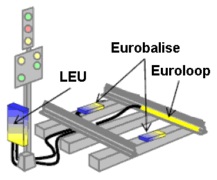 Auf Streckenabschnitten ohne ETCS Level 2 müssen neben den Informationen von ETCS Level 1 LS weiterhin auch die Integra-Signum- und ZUB-Telegramme übertragen werden.